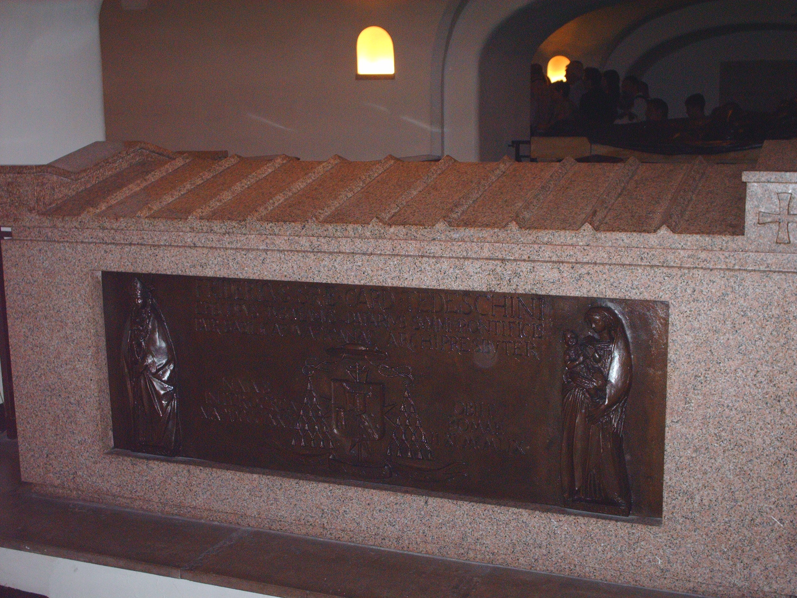 Federico cardinal Tedeschini tomb, "grotte vaticane", Basilica di San Pietro